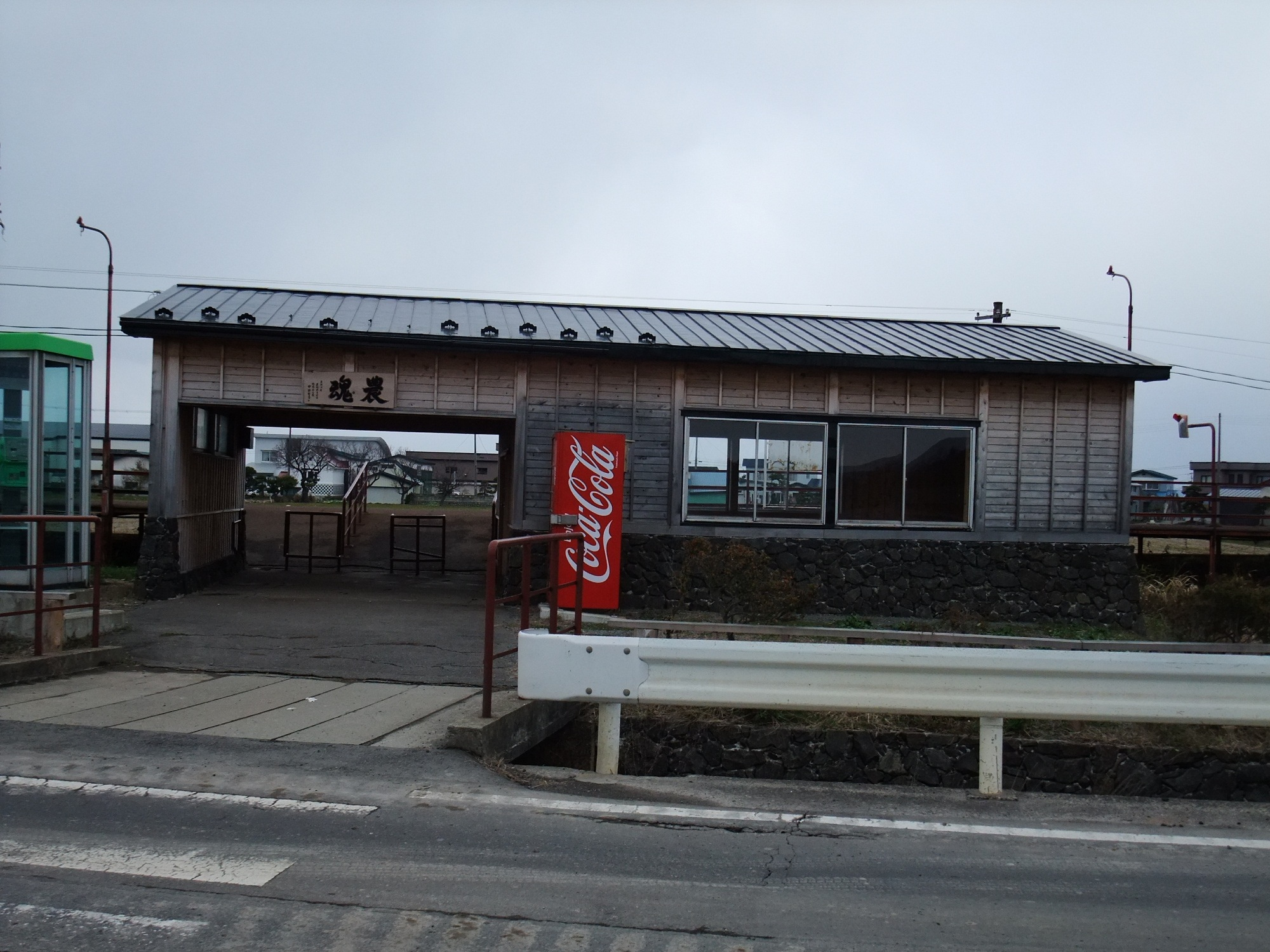 津軽鉄道 五農高校前駅